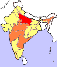 Kartorna bygger på resultat i senaste delstatsval (Juni 2004). Rött betyder att partiet deltar i delstatsregeringen, orange att partiet vann mandat i senaste delstatsvalet och gult att partiet hade lanserat kandidater men utan att vinna mandat. Kartorna tar inte hänsyn till avhopp, partifusioner och fyllnadsval under den ordinarie mandatperiodens gång. Skapad av Soman.